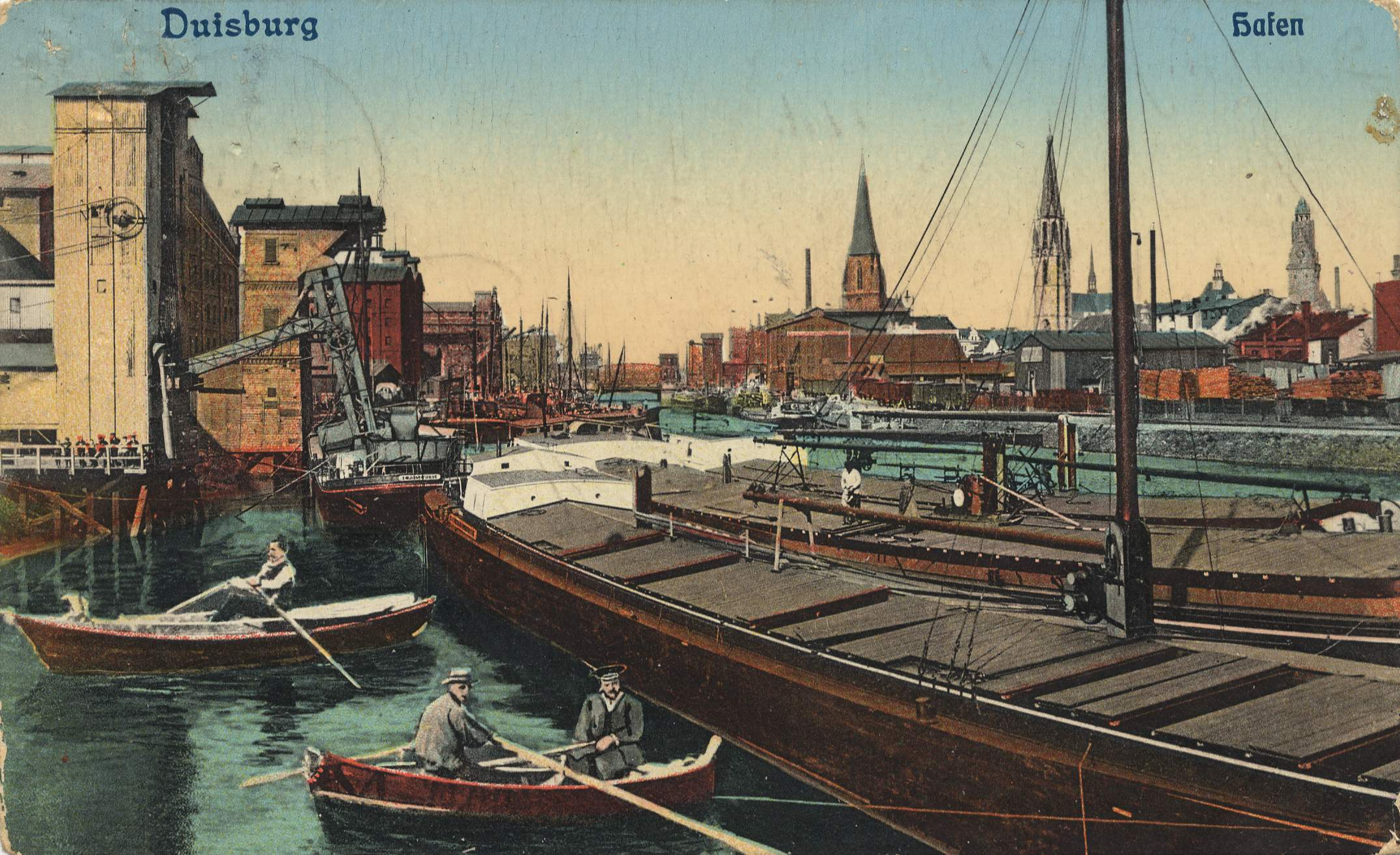 Historische Postkarte von Duisburg von 1911